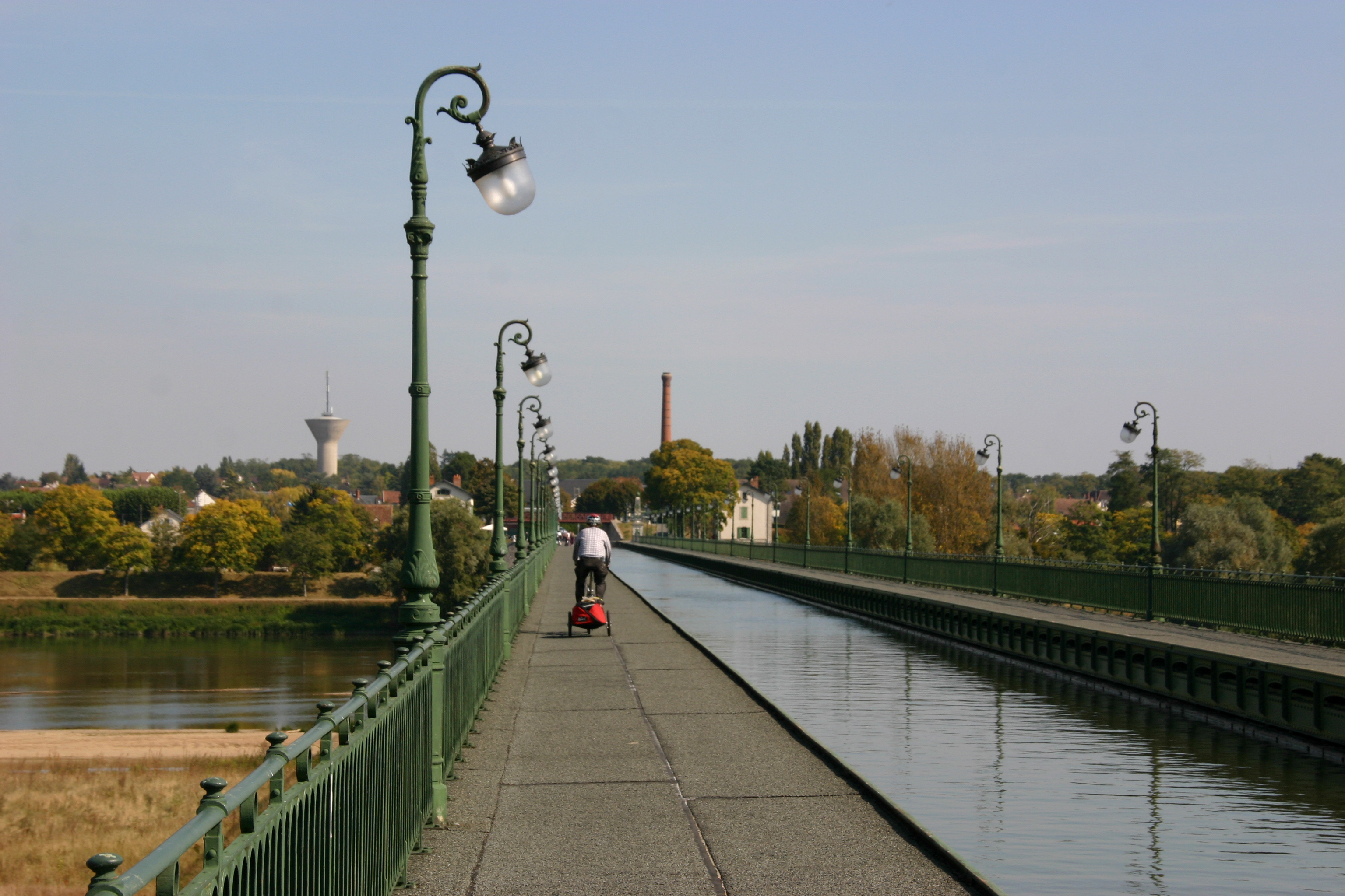 Kanalbrücke Briare; auf ihr quert der Canal latéral à la Loire den tiefer gelegenen Fluss Loire.